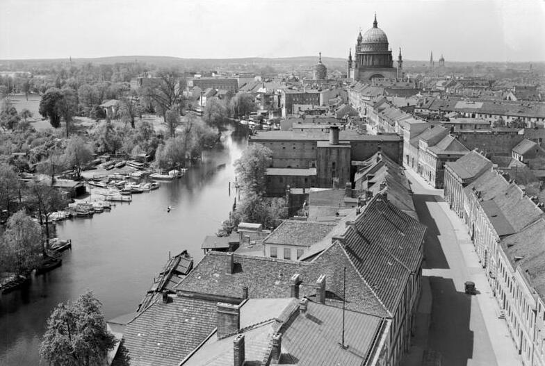 Potsdam.- Blick vom Turm der Heiliggeistkirche (Heiligengeistkirche)